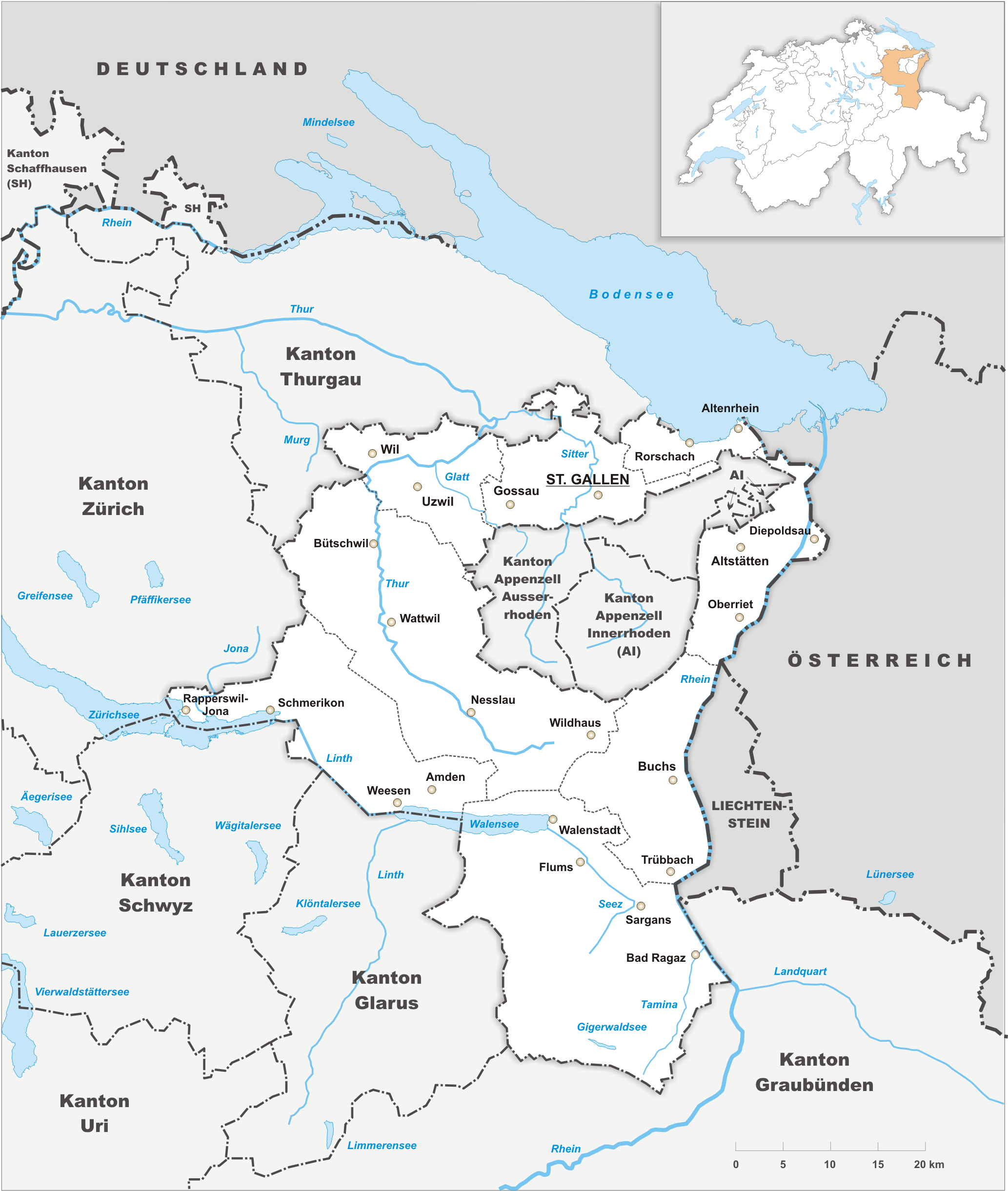 Karte des Kanton St. Gallen.